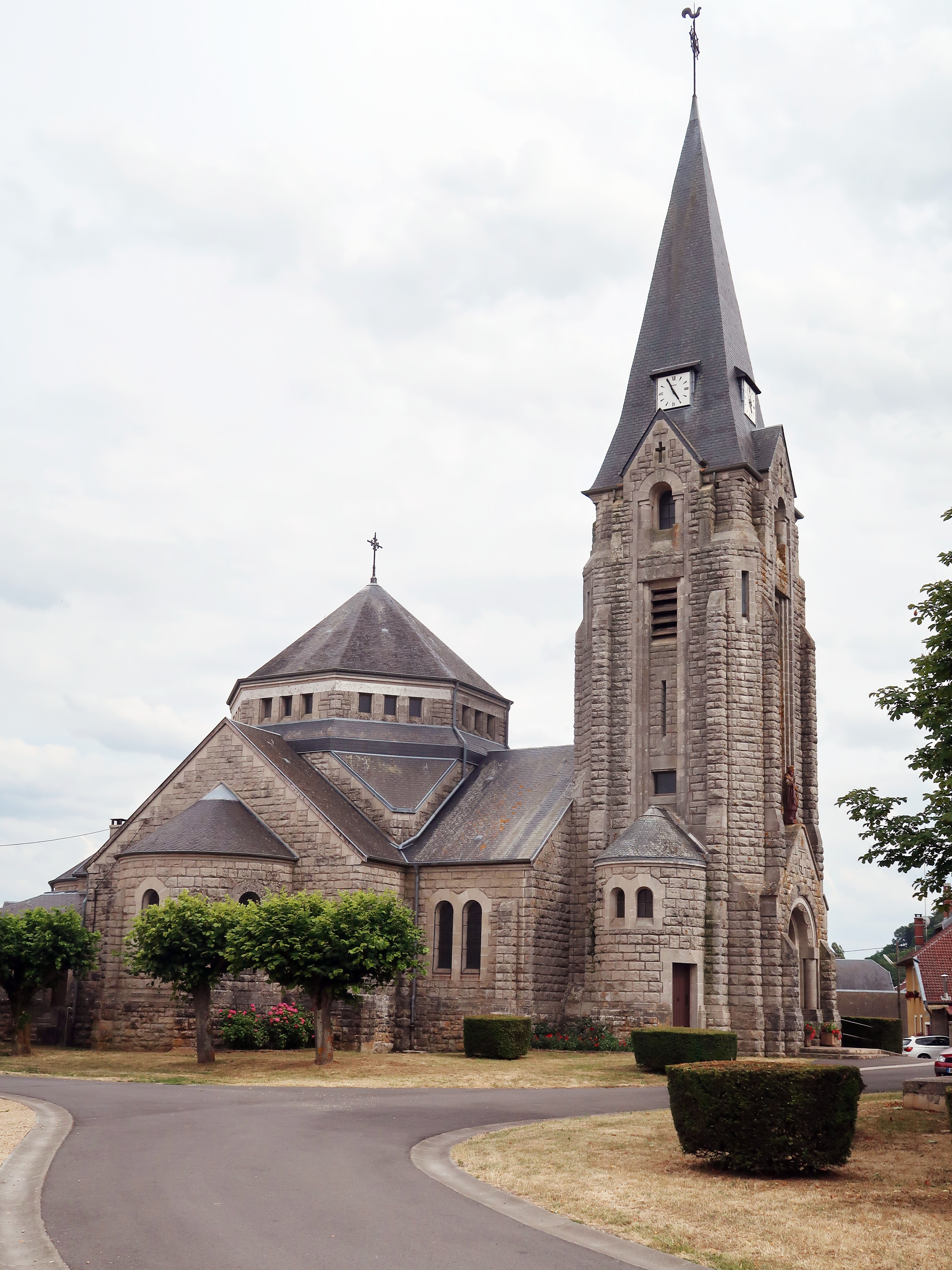 Montigny-devant-Sassey, église